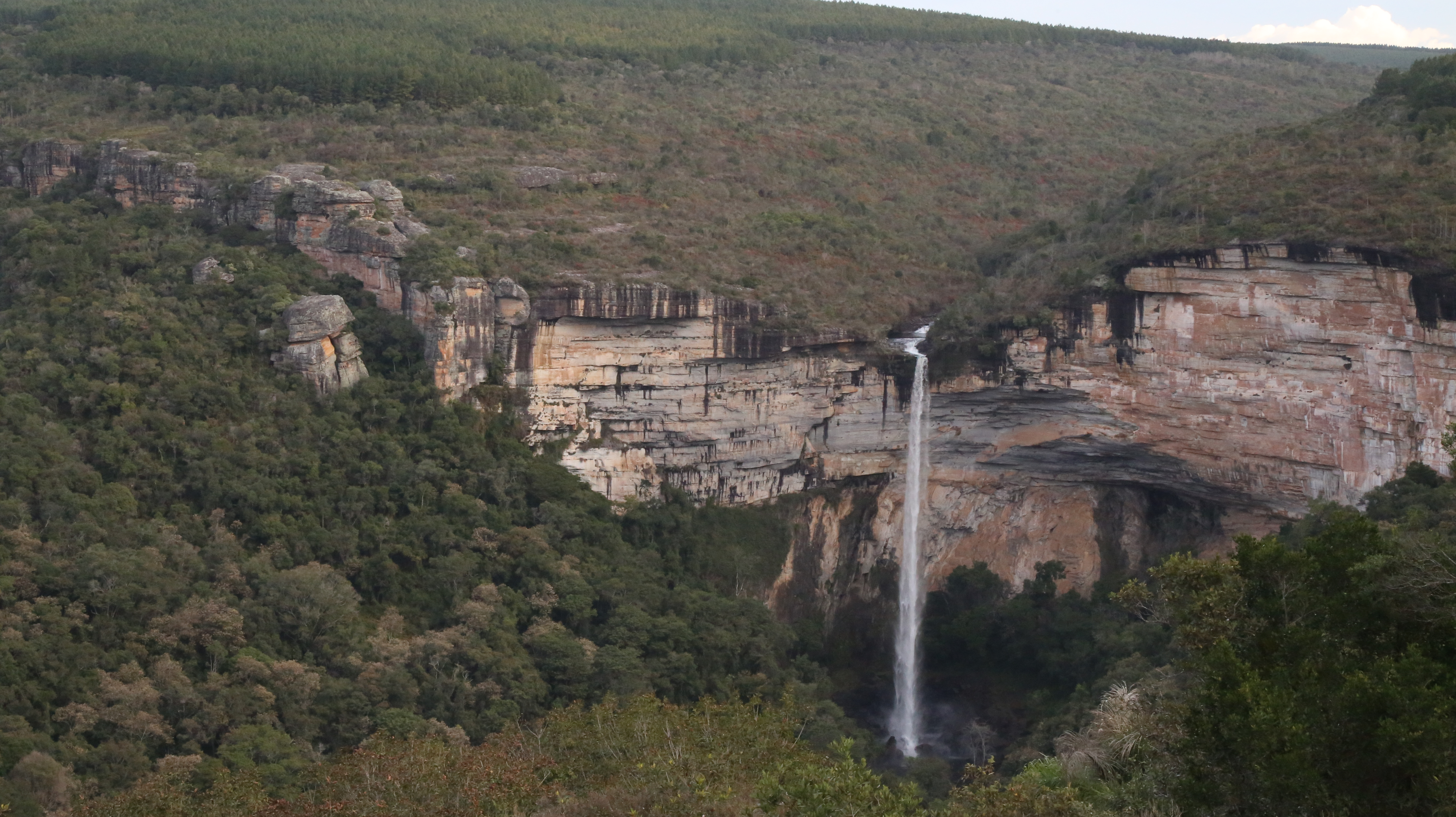 Com 106 metros de queda d'água a Cachoeira do Corisco, no Vale do Corisco, próximo a Sengés, Paraná, Brasil.